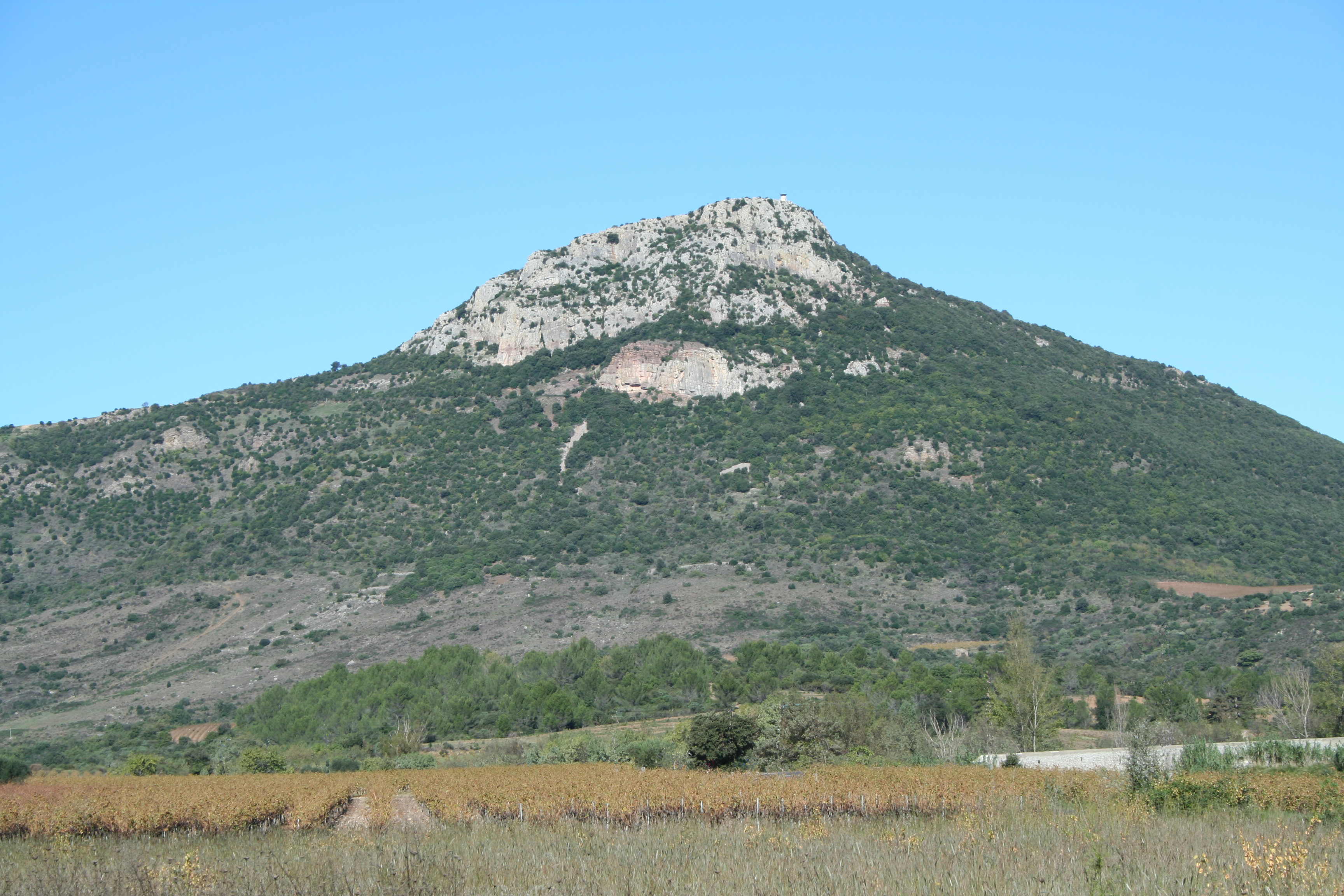 Cabrières (Hérault) - Pic de Vissou (480 m).